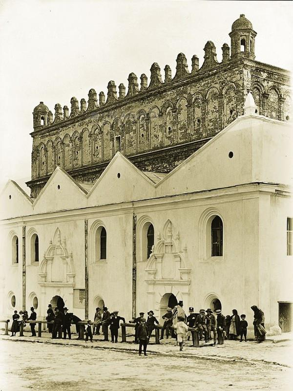 Синагога в Жолкве.